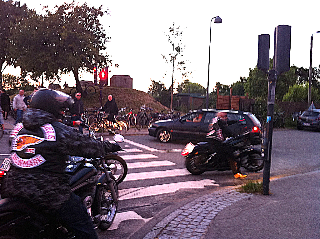 Mitglieder der Hells Angels Denmark in Sundbyøster in Kopenhagen-Christianshavn im Juni 2011.